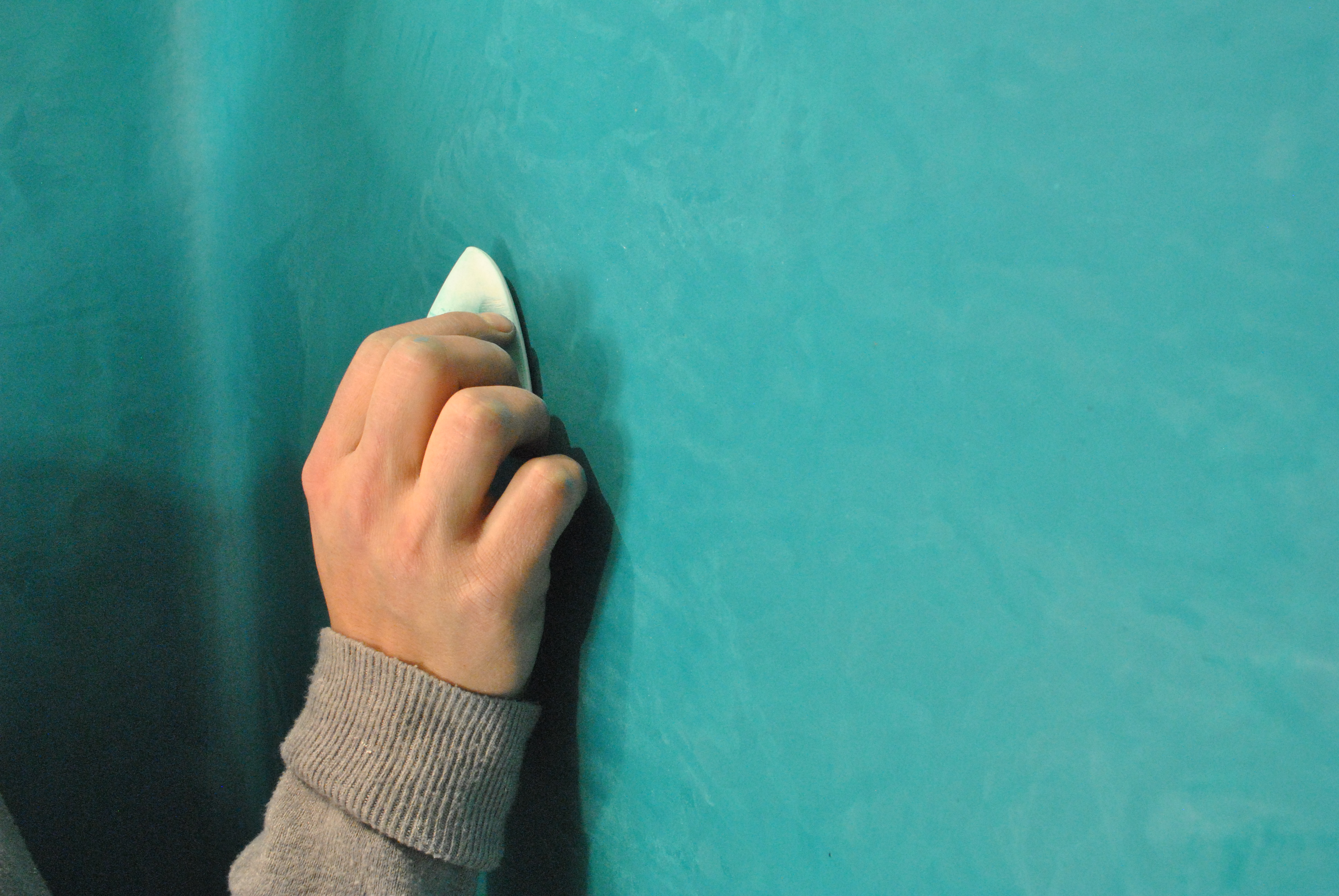 Tadelakt wordt 'gesteend'. Bron: Eigenheym